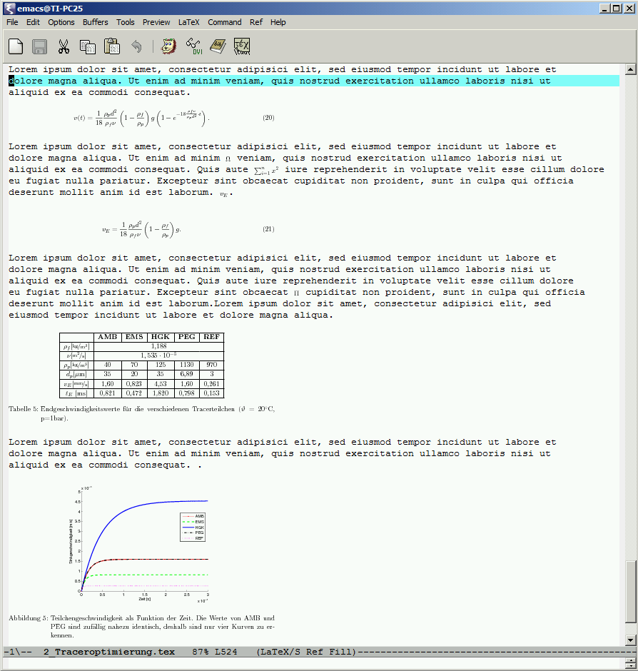 Screenshot von Emacs+AUCTeX